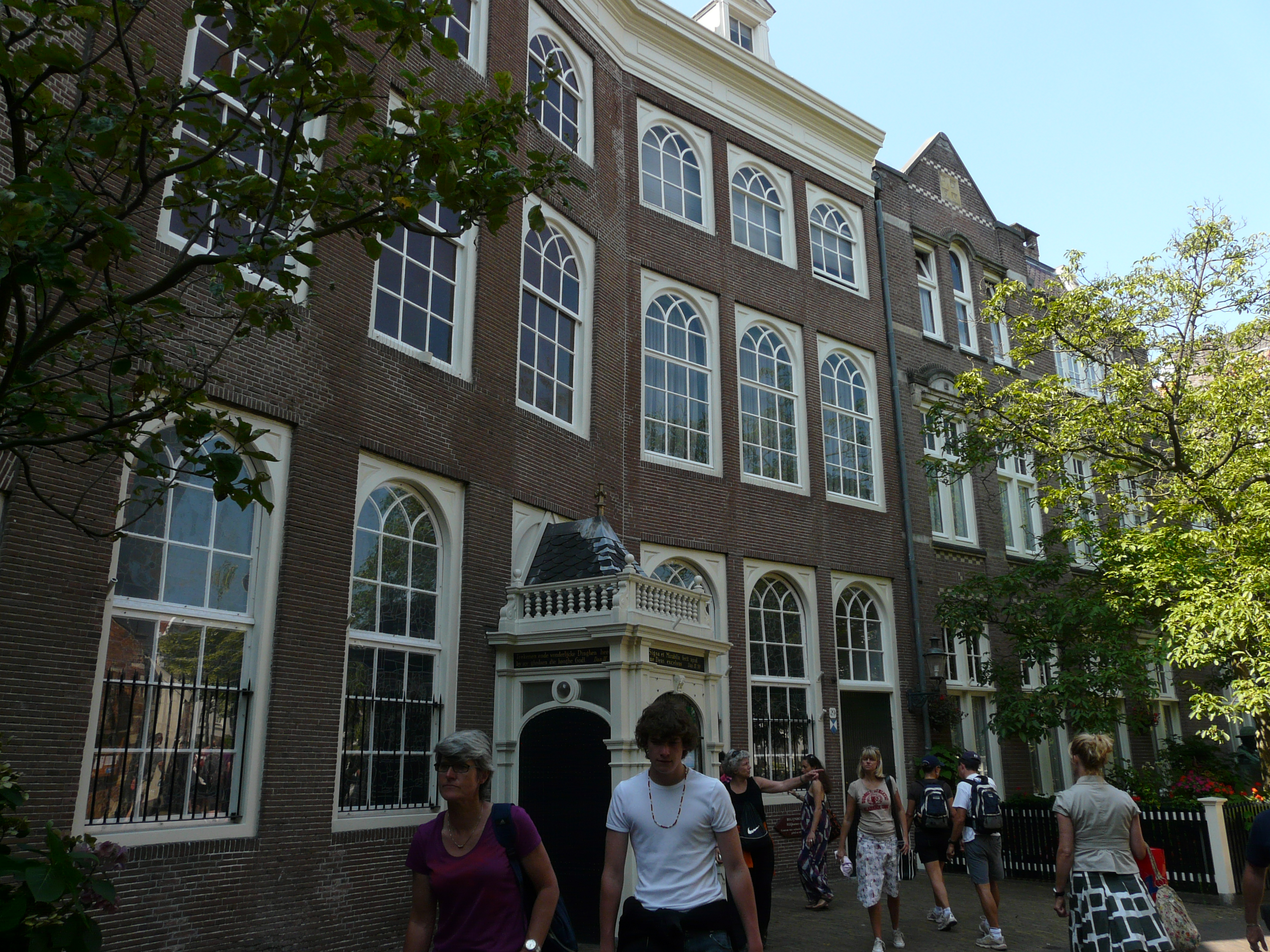 Ingang van de Begijnhofkapel (Amsterdam)